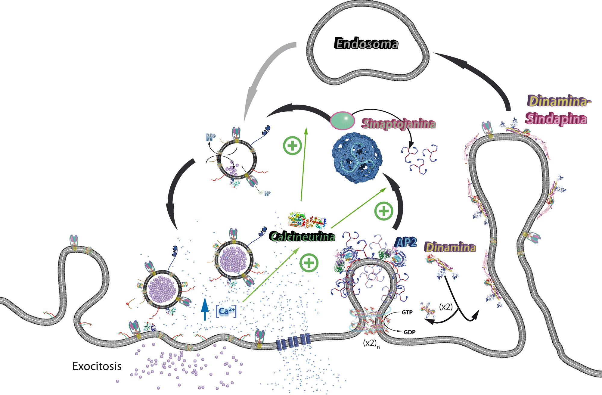 Basic model of synaptic endocytosis